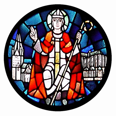 Das Bild zeigt den Heiligen Liborius thronend vor den Kathedralen von Paderborn und Le Mans. Es handelt sich um eine Darstellung aus dem Fenster des Paderborner Domturmes, welches ich selbst fotografiert und per EDV nachbearbeitet habe. Für den Fall, dass das Fenster als 2D-Kunstwerk gilt, dürfte es alt genug sein. --Crux 01:36, 22. Feb 2006 (CET)